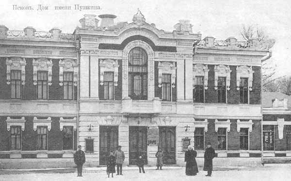 дореволюционное фото